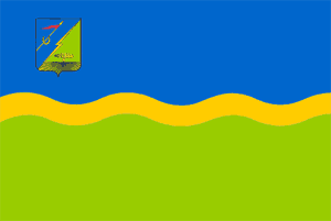 Флаг Марьинского района Донецкой области